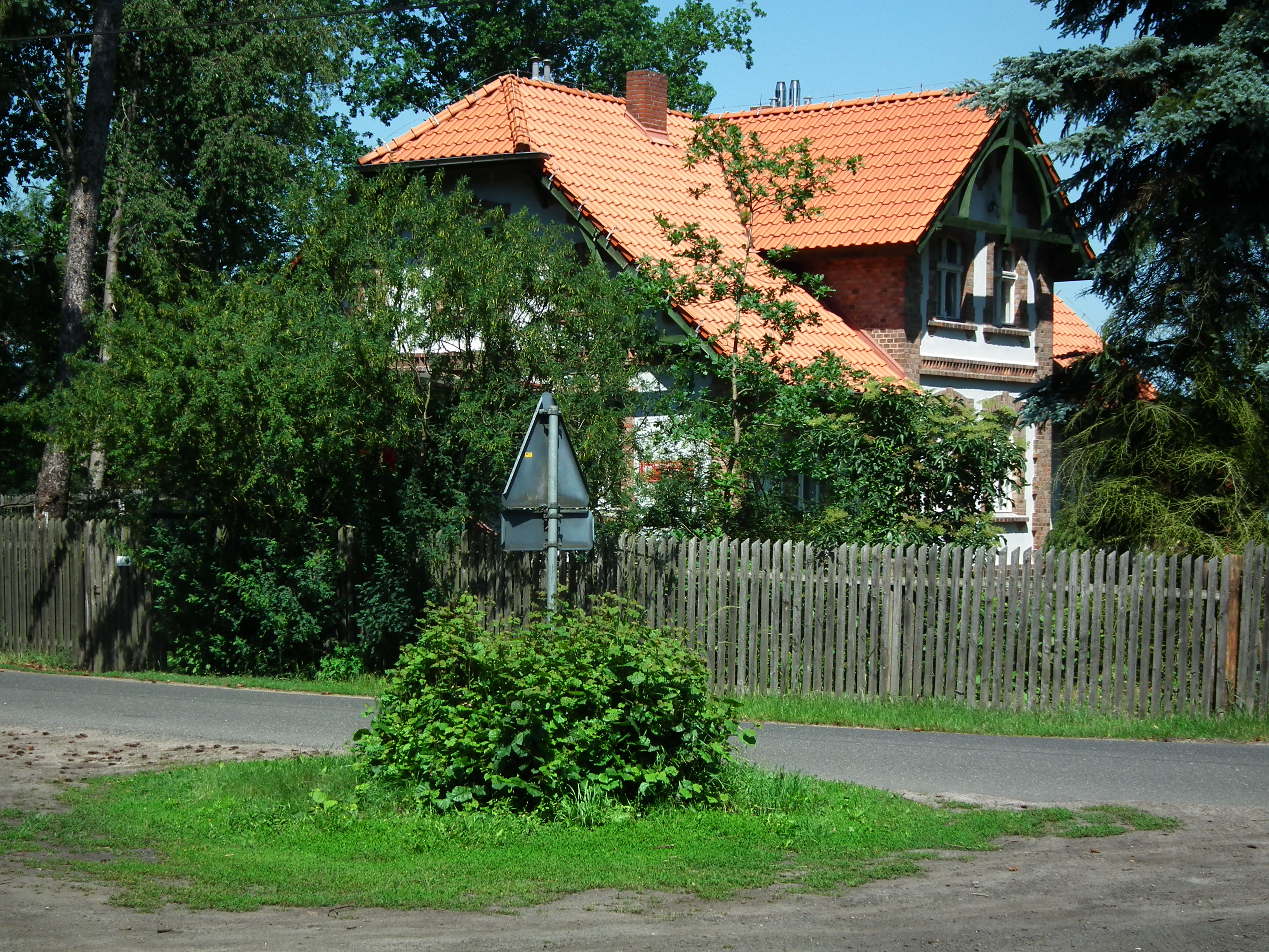 Leśniczówka Daniele koło Obrzycka.